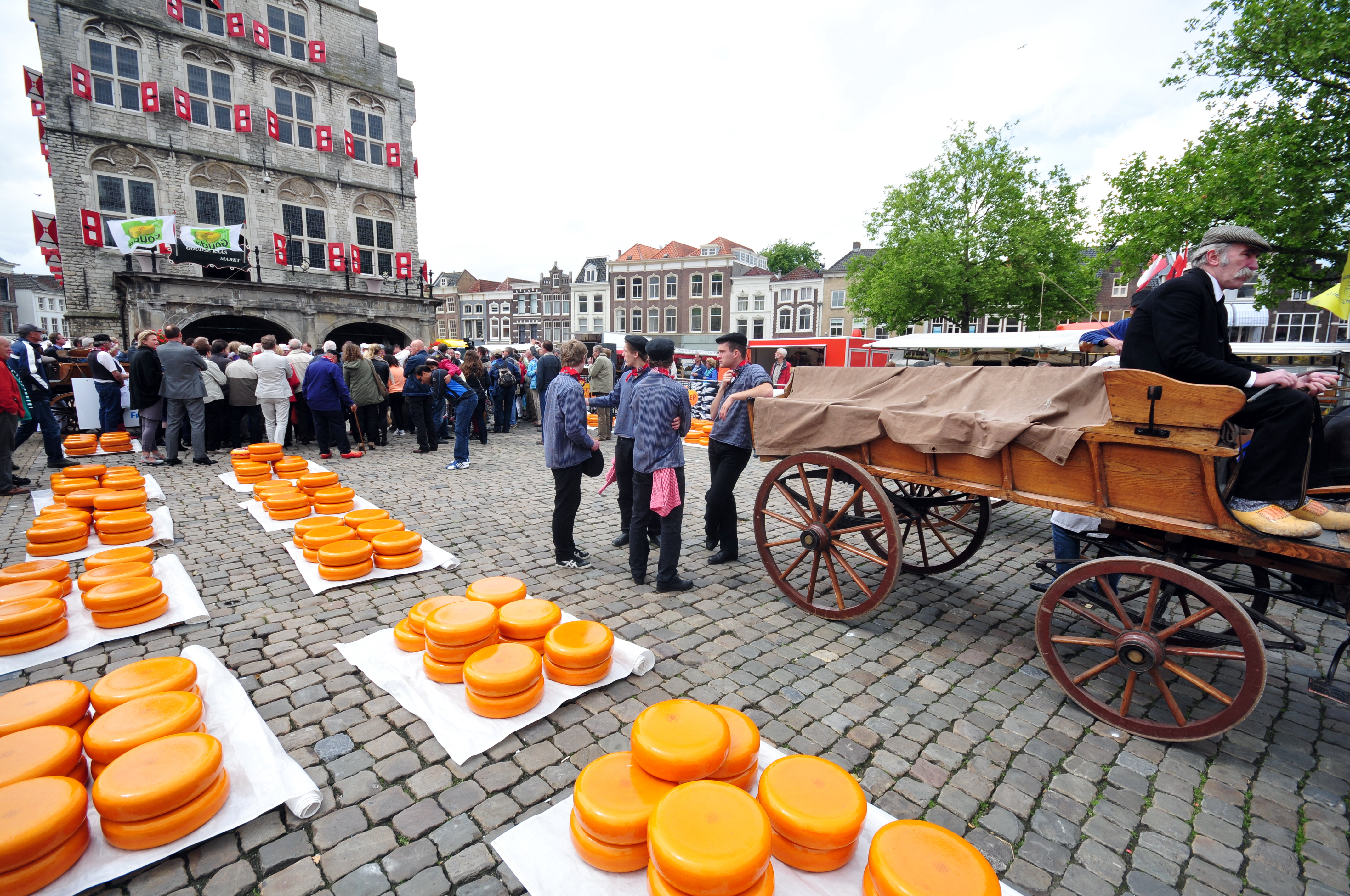 Gouda, Niederlande, Stadtzentrum